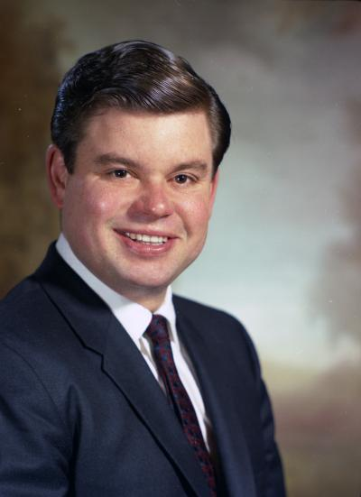 Representative Dave Ceccarelli, 1967